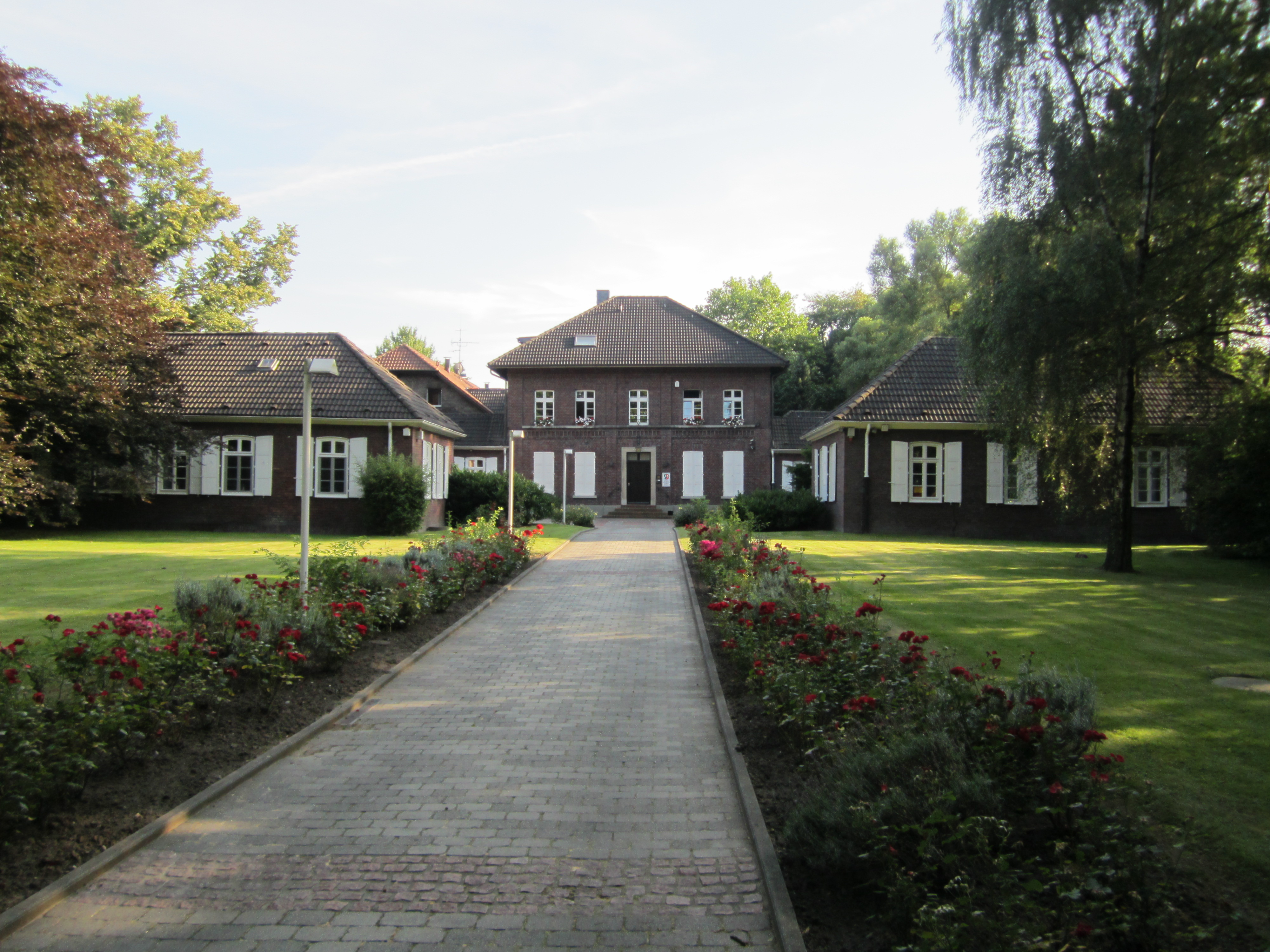 Haus der Werkfürsorge Zollverein in Essen-Katernberg